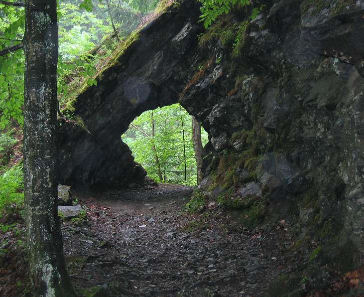 Aaschlucht bei Engelberg OW. Die Refraktionsartefakte im Bild stammen von Regentröpfchen auf dem Objektiv.